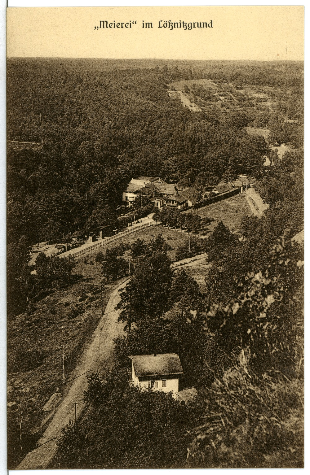 Radebeul; Lößnitzgrund mit Meierei This postcard is from publisher Brück & Sohn in Meißen ( postcard has a unique number 10535 and is available in a higher resolution at the publisher. This images was uploaded in a cooperation project between Wikipedians and the publisher.